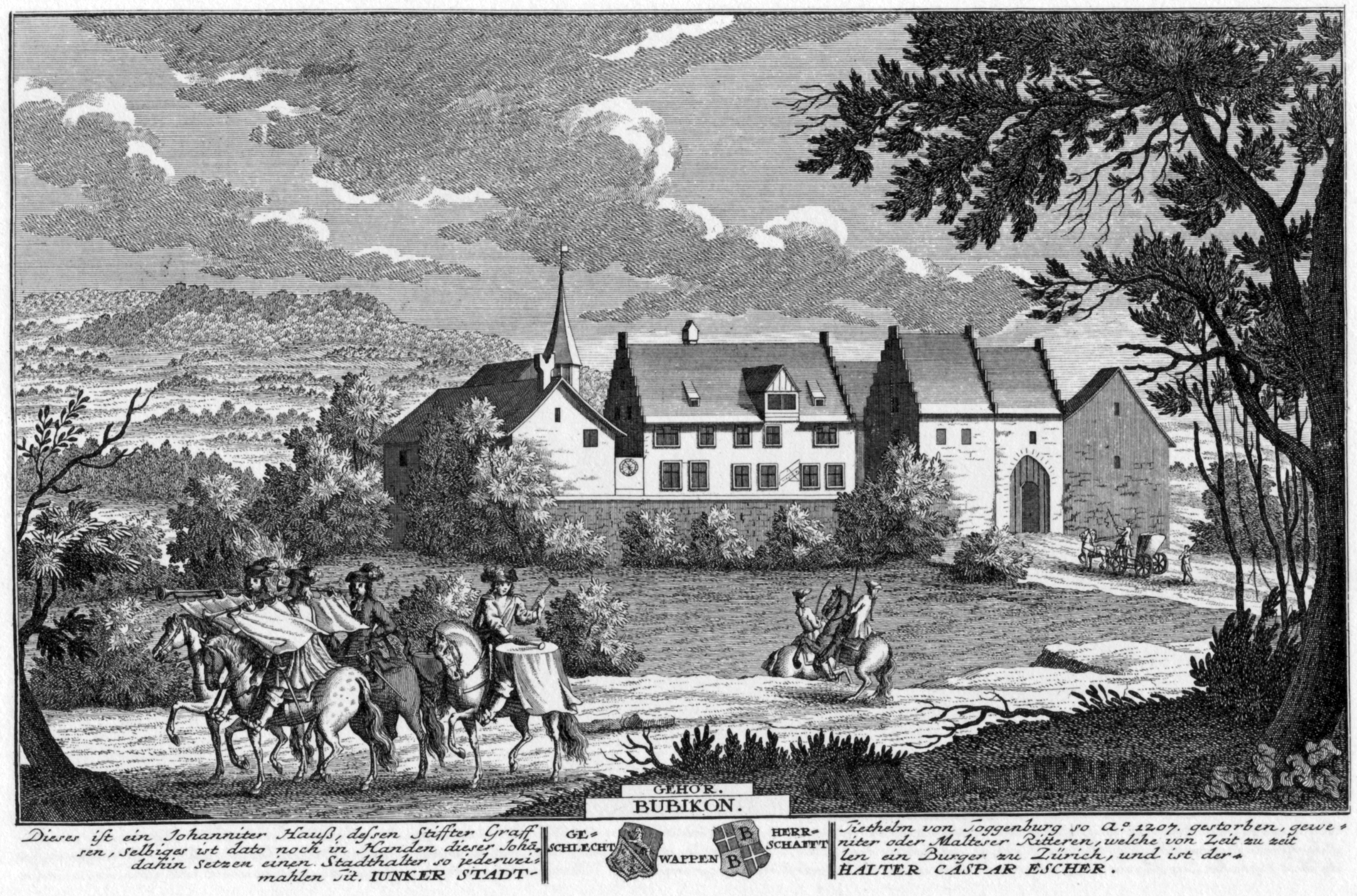 Ansicht der Johanniterkommende Bubikon, ca. 1742. Radierung von David Herrliberger. Erschienen in Eigentliche Vorstellung der Adelichen Schlösser im Zürich Gebieth, Nr. 2, 1742 und Topographie der Eydgenoßschaft